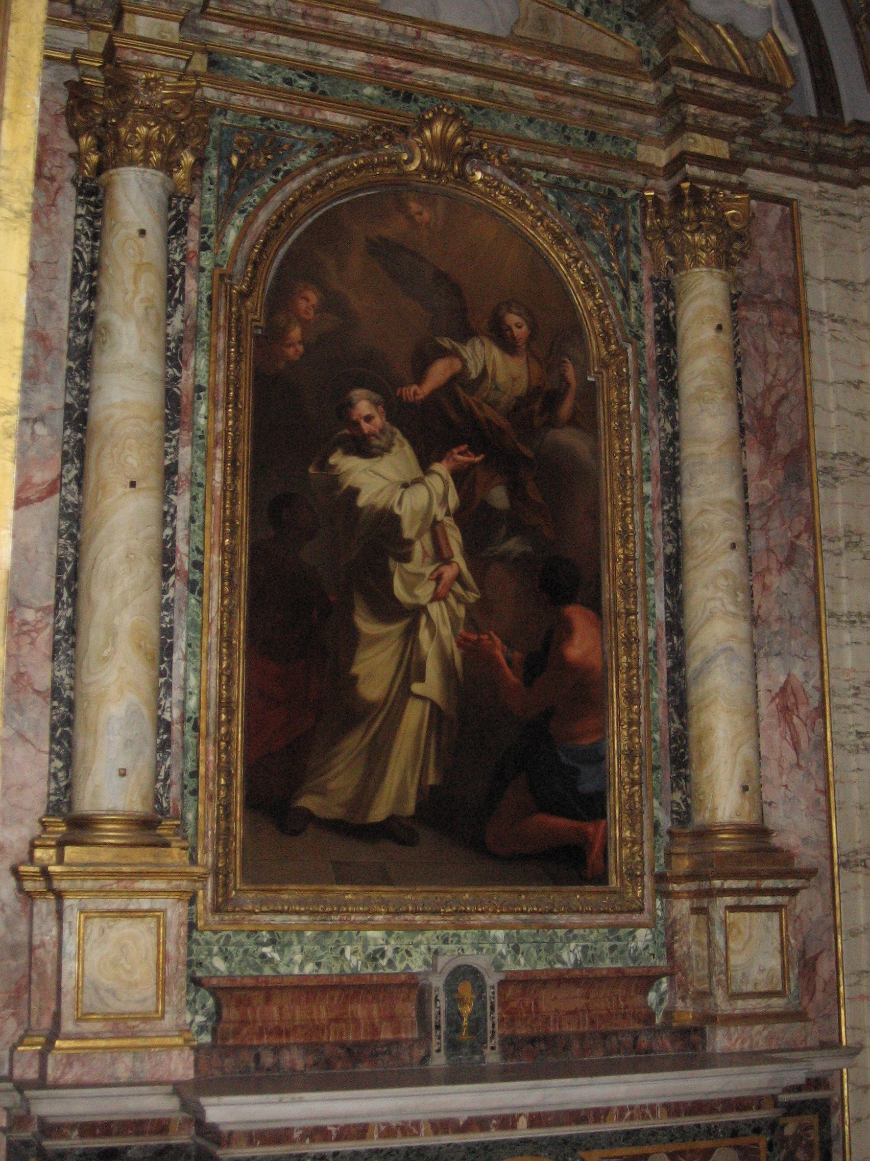 Tableau représentant Jean de Matha, se trouvant dans l'église des pères trinitaires (église de la Sainte-Trinité), à Rome